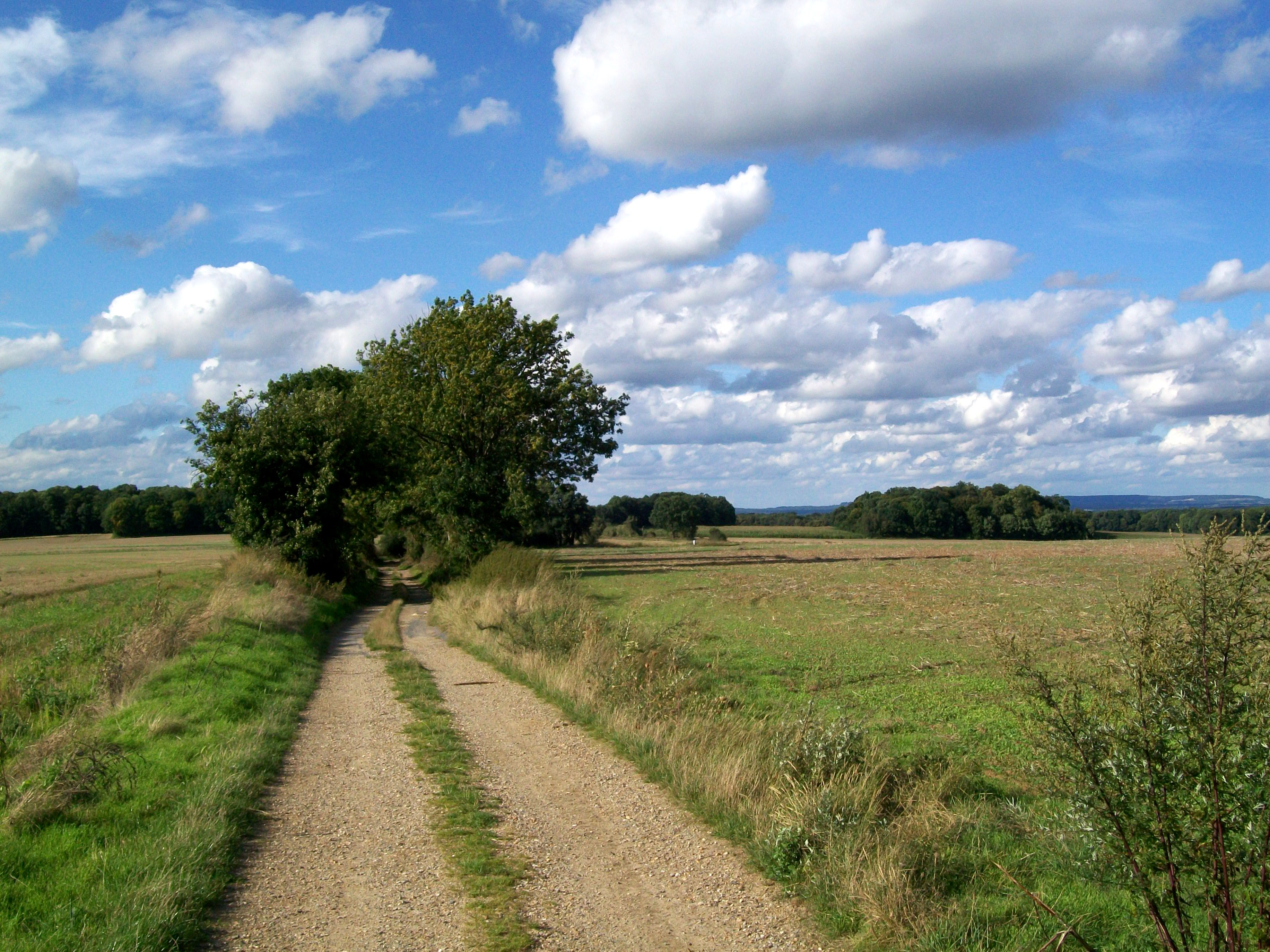 Le chemin rural des Vaches à Survilliers (95).